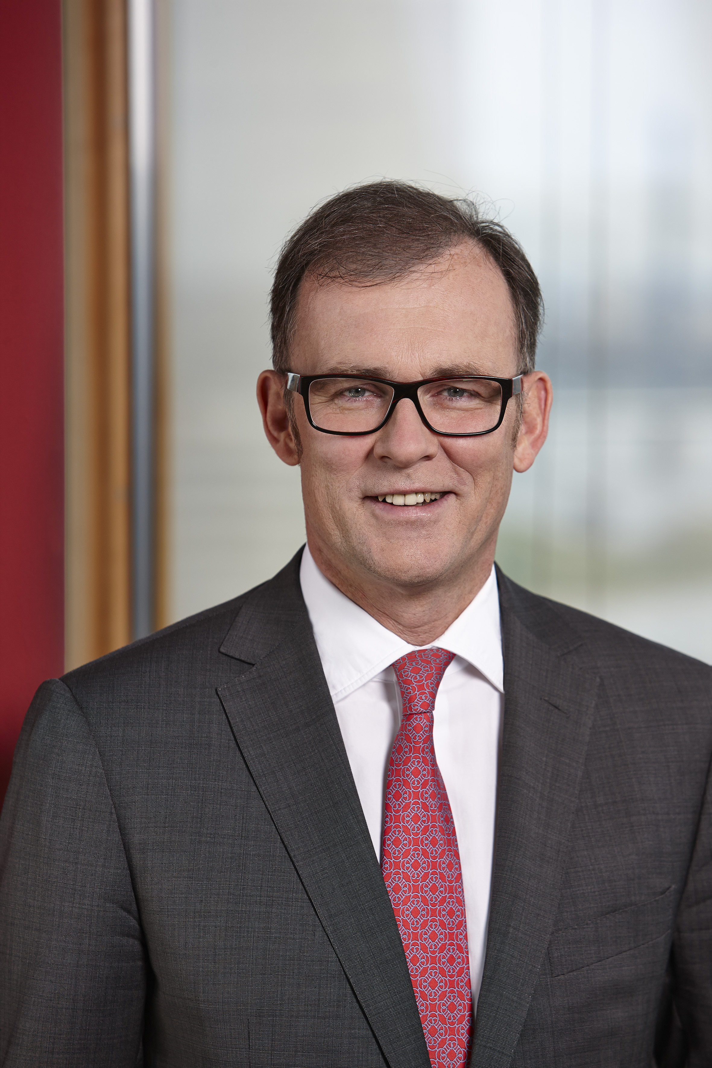 Oliver Bell – Vorstand Aluminiumkonzern Norsk Hydro ASA Porträt